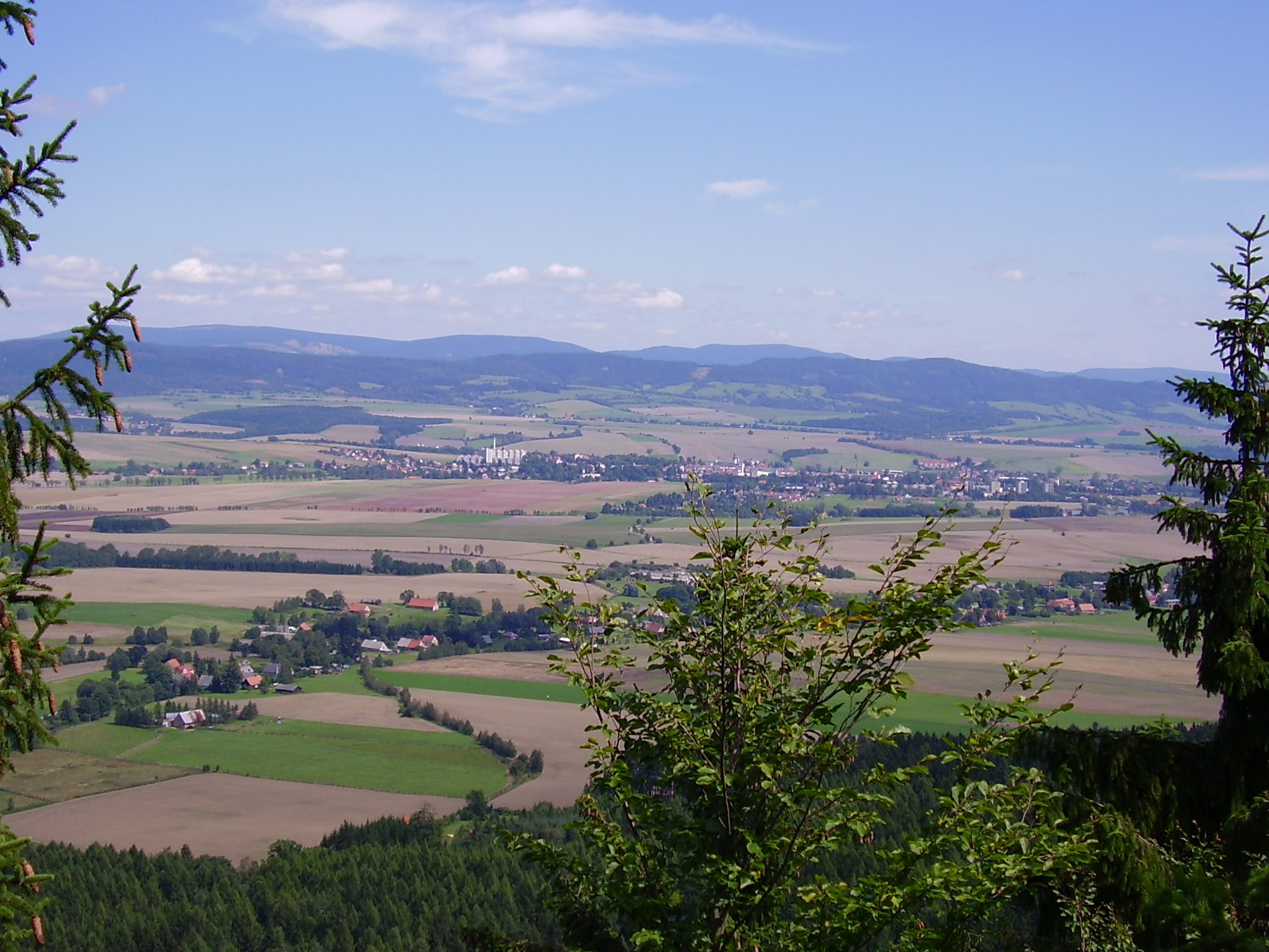 Hvězda (kaple) - pohled k Broumovu